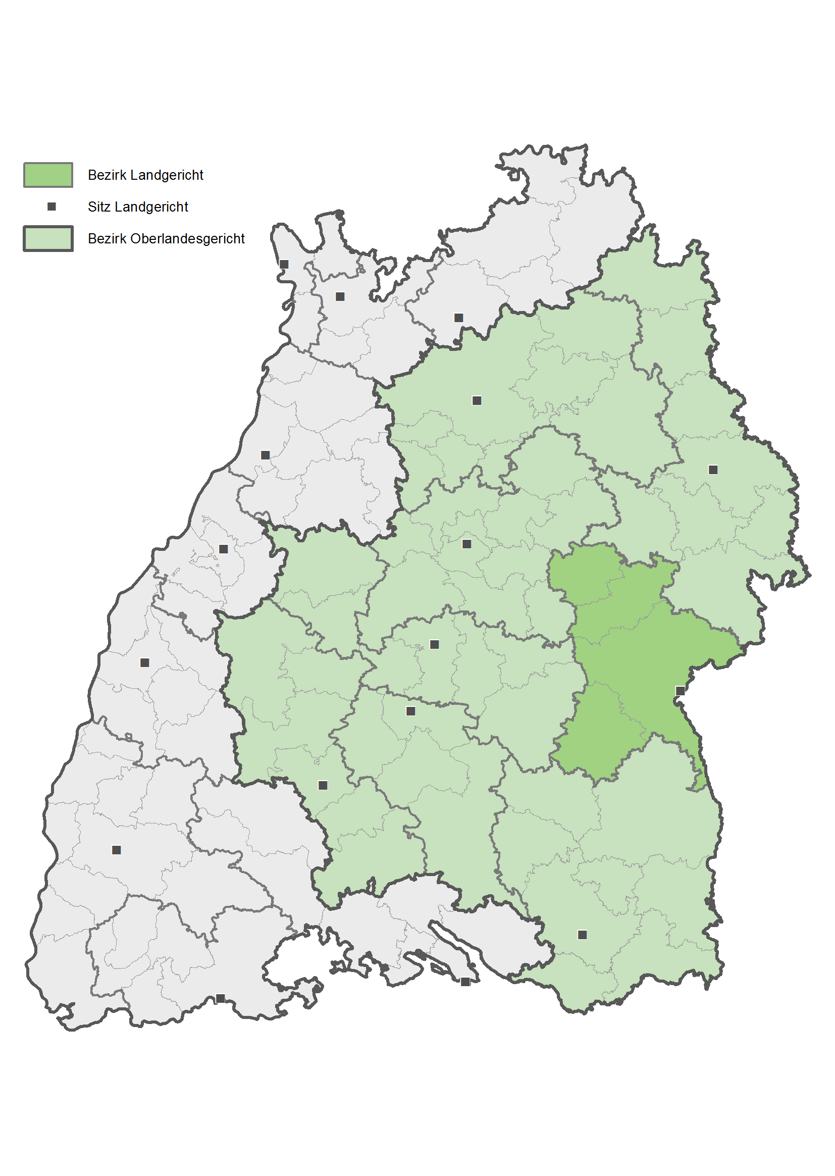 Karte des Bezirks des Landgerichts Ulm in Baden-Württemberg